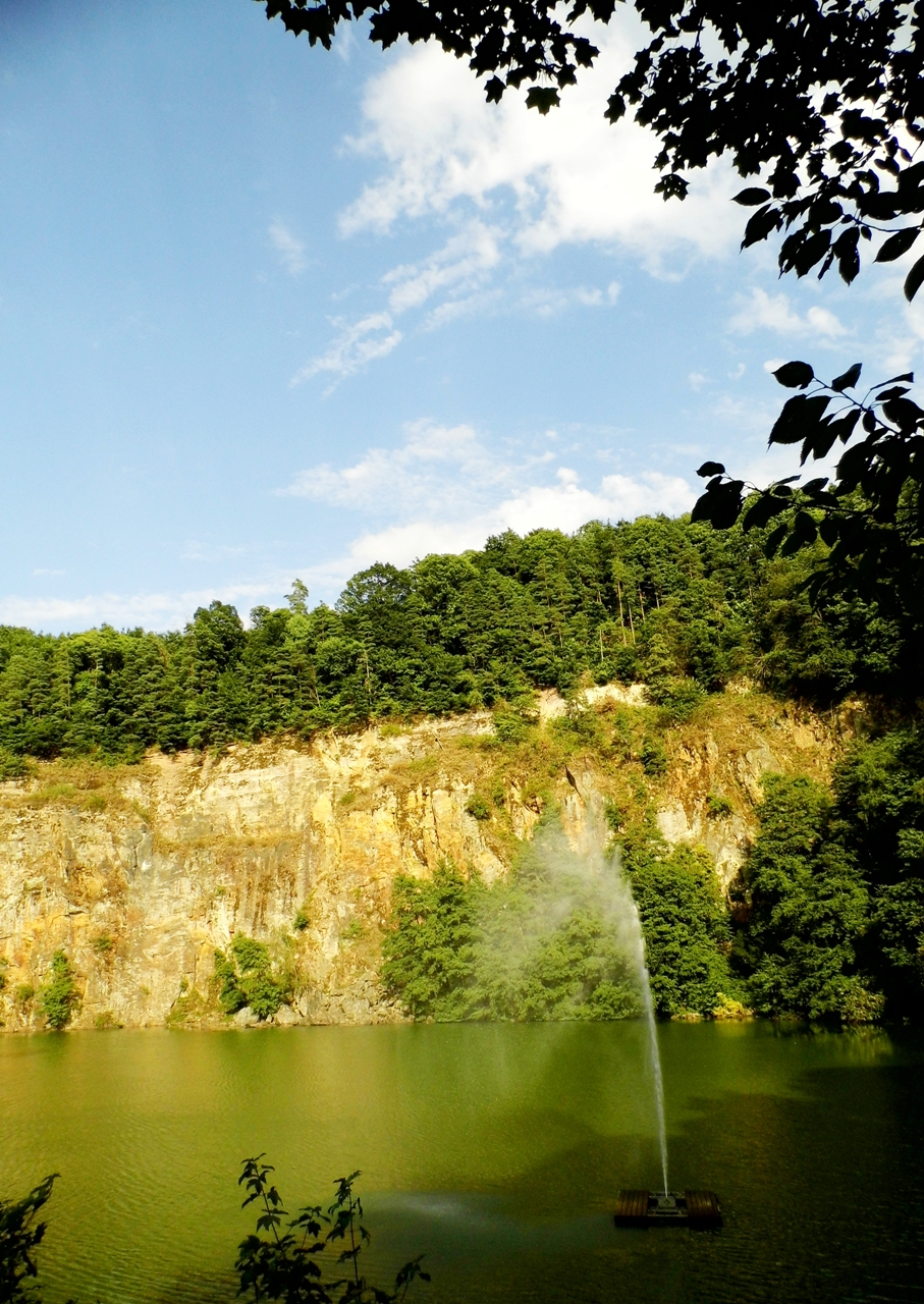 Bergsee